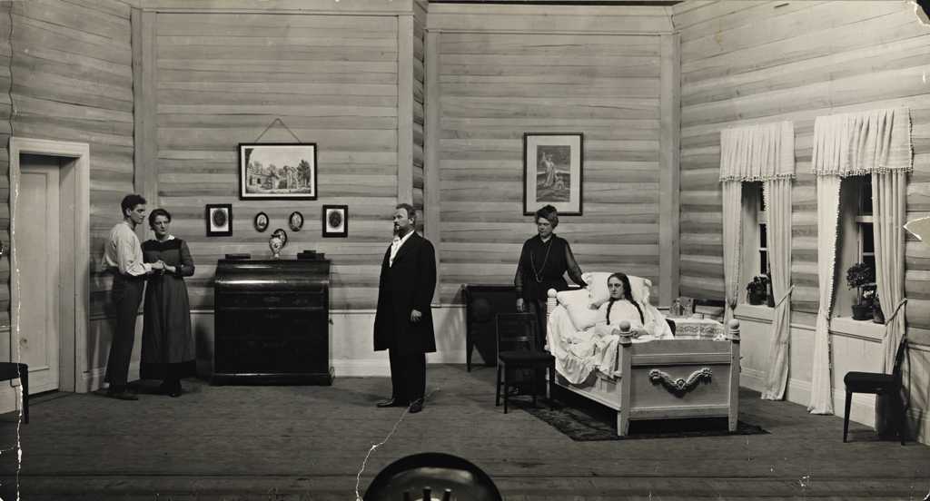 Tittel / Title: Scene fra "Over Ævne”. Nationaltheatret, 1918. Motiv / Motif: Fra venstre: August Oddvar som Elias, Aagot Didriksen som Rakel, Halfdan Christensen som Sang, Agnethe Schibsted-Hansson som Hanna Roberts og Johanne Dybwad som Klara Sang. Dato / Date: 1918 Fotograf / Photographer: Ukjent Sted / Place: Oslo Eier / Owner Institution: Nasjonalbiblioteket / National Library of Norway Lenke / Link: Bildesignatur / Image Number: no-nb_bldsa_BB1027 Bla i digital utgave av manuskriptet til "Over Ævne" Les Over ævne . Første stykke (Gyldendal , 1883) i fulltekst i NBdigital.